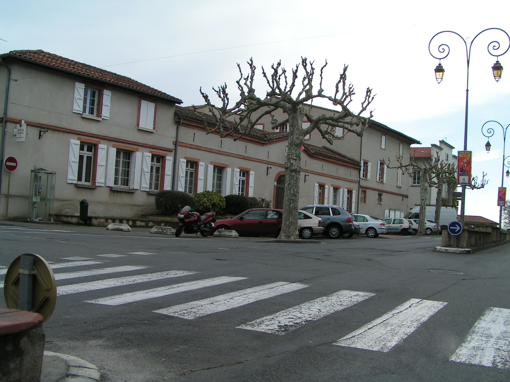 Mairie de Carbonne (Haute-Garonne, France).